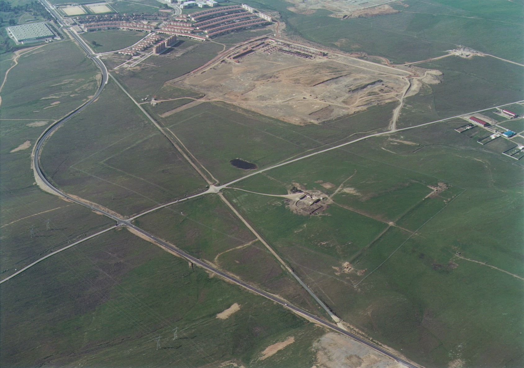 Desvío de la EX-390 evitando el campamento romano que dio origen a la ciudad de Cáceres